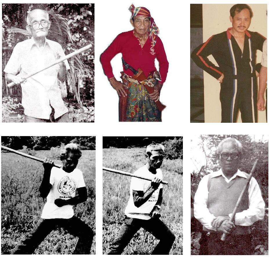 Major Systems